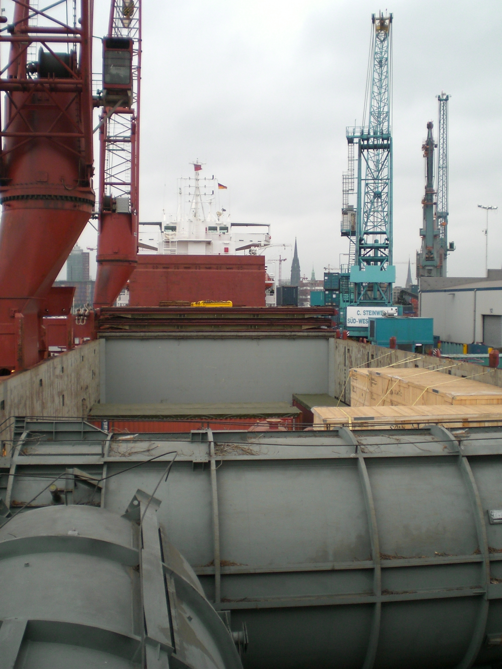 MPP Schwergutschiff 2x 150t SWL